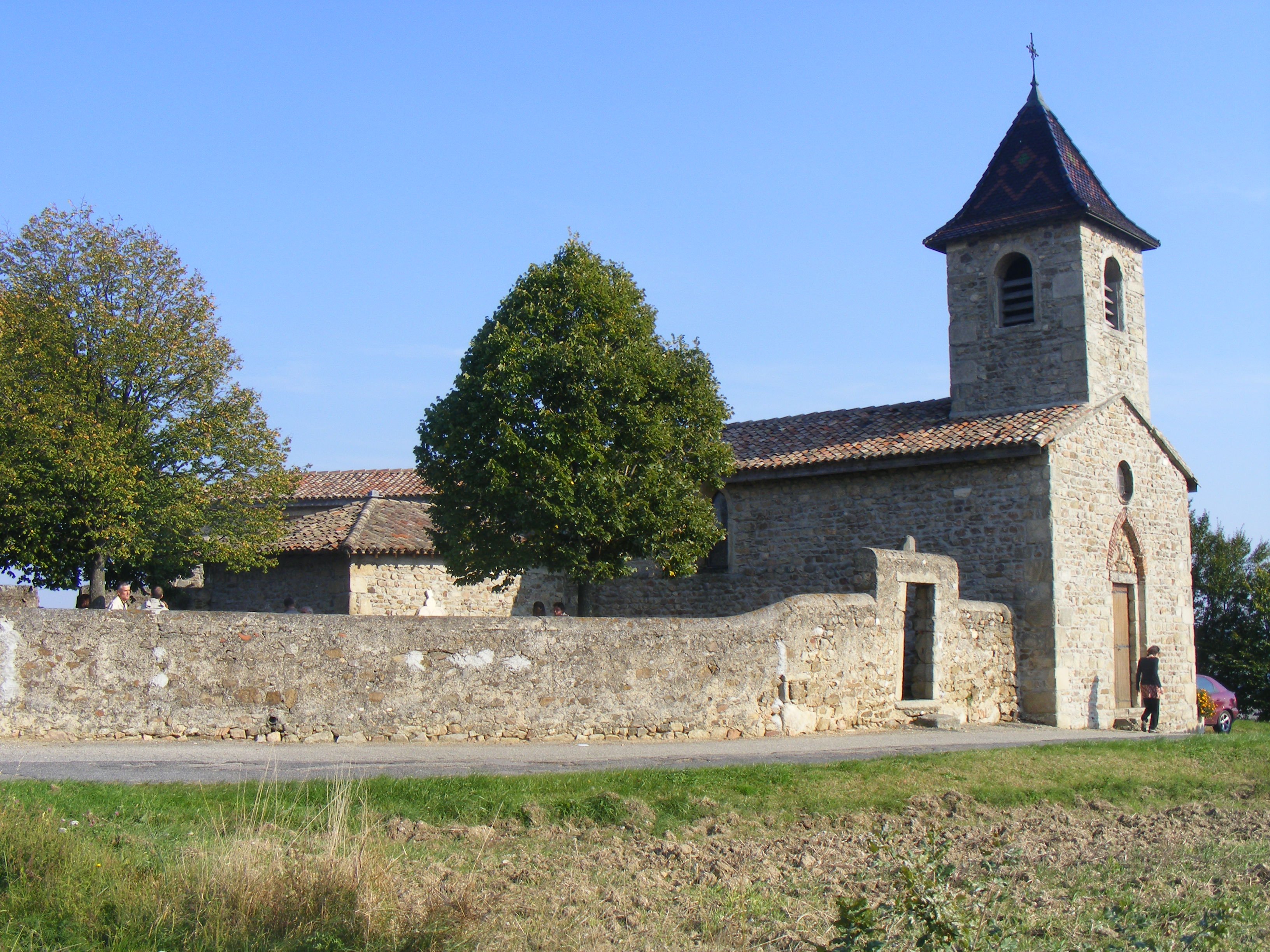 Eglise de Saint-Martin-de-Cornas (Département du Rhône-france